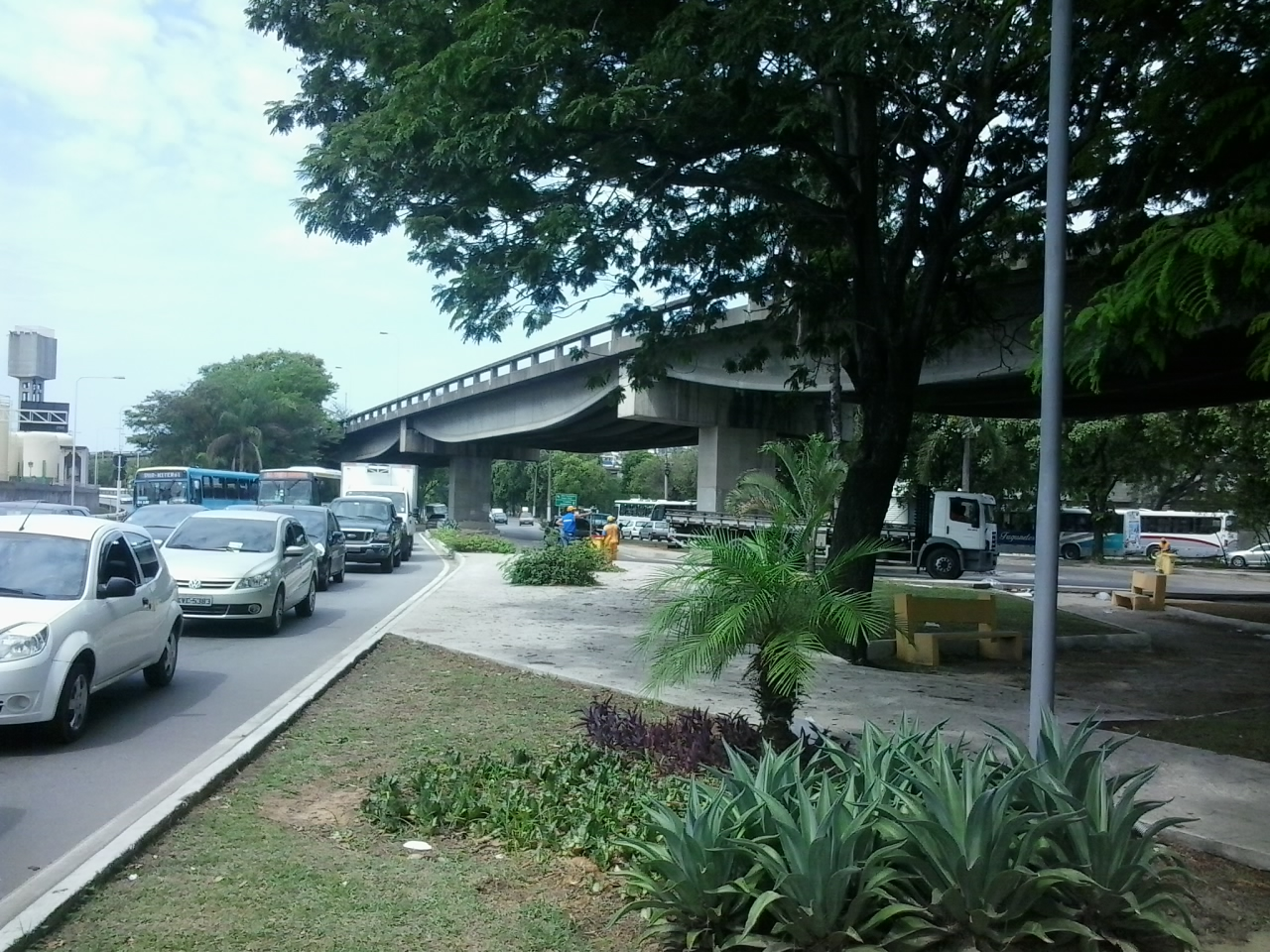 Trecho da Praça Renascença Fluminense, zona portuária, Centro, Niterói.